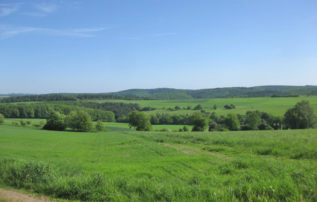 Anicht des Kemeler Rückens von Südwesten (bei Hausen v.d. Höhe)